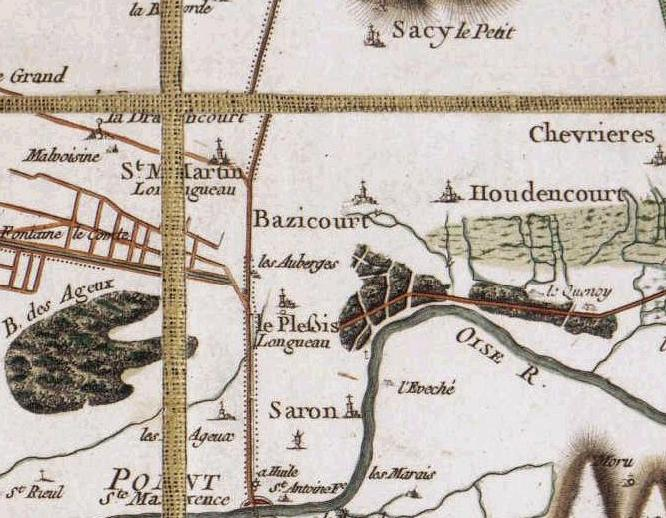 Bazicourt (60) par la carte de Cassini.